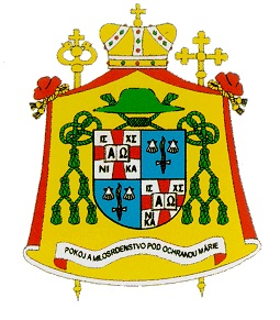 Znak biskupa Jána Hirky